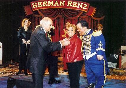 De directie van Circus Herman Renz ontvangt koninklijke onderscheiding. Eigen foto